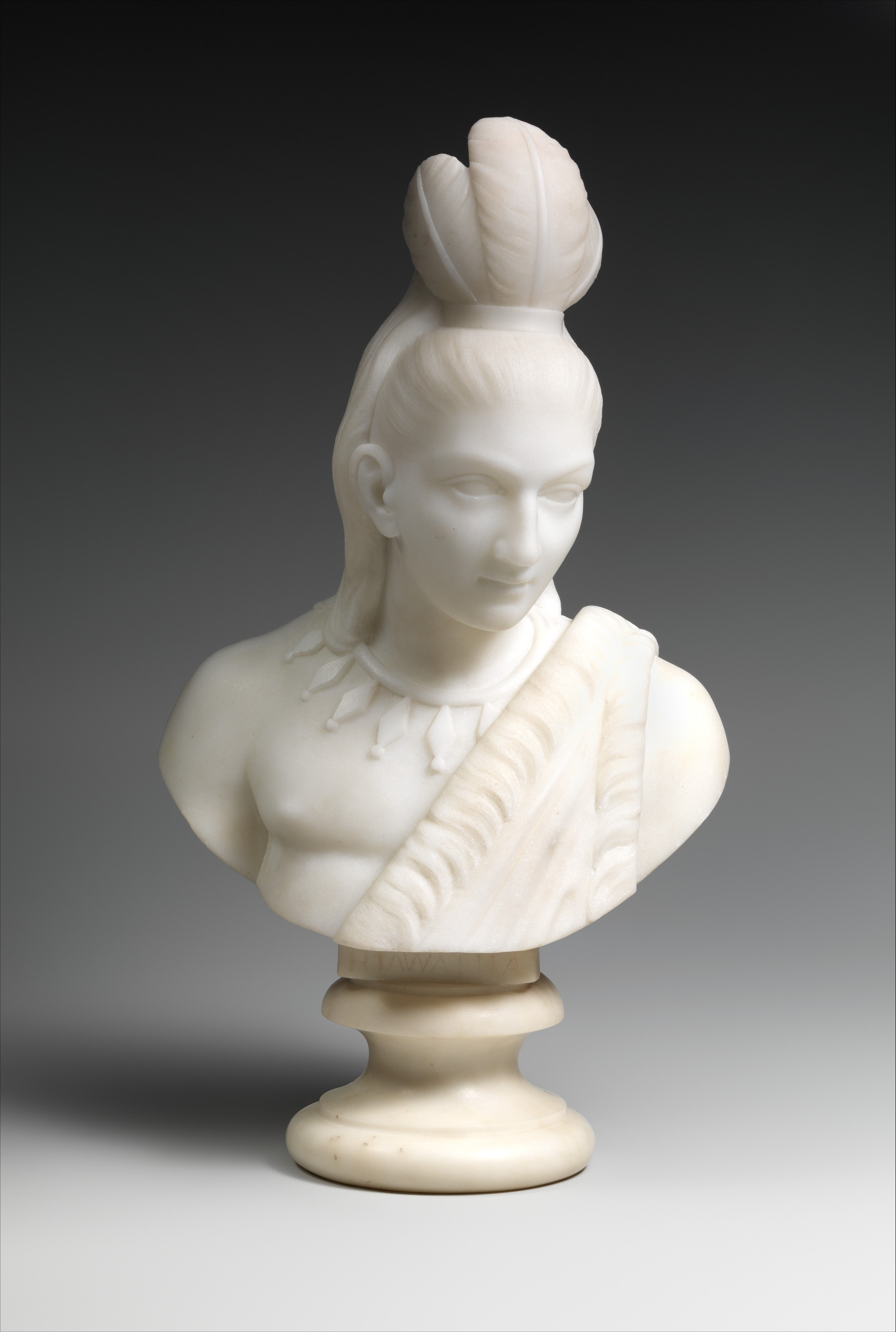 Bust; Sculpture